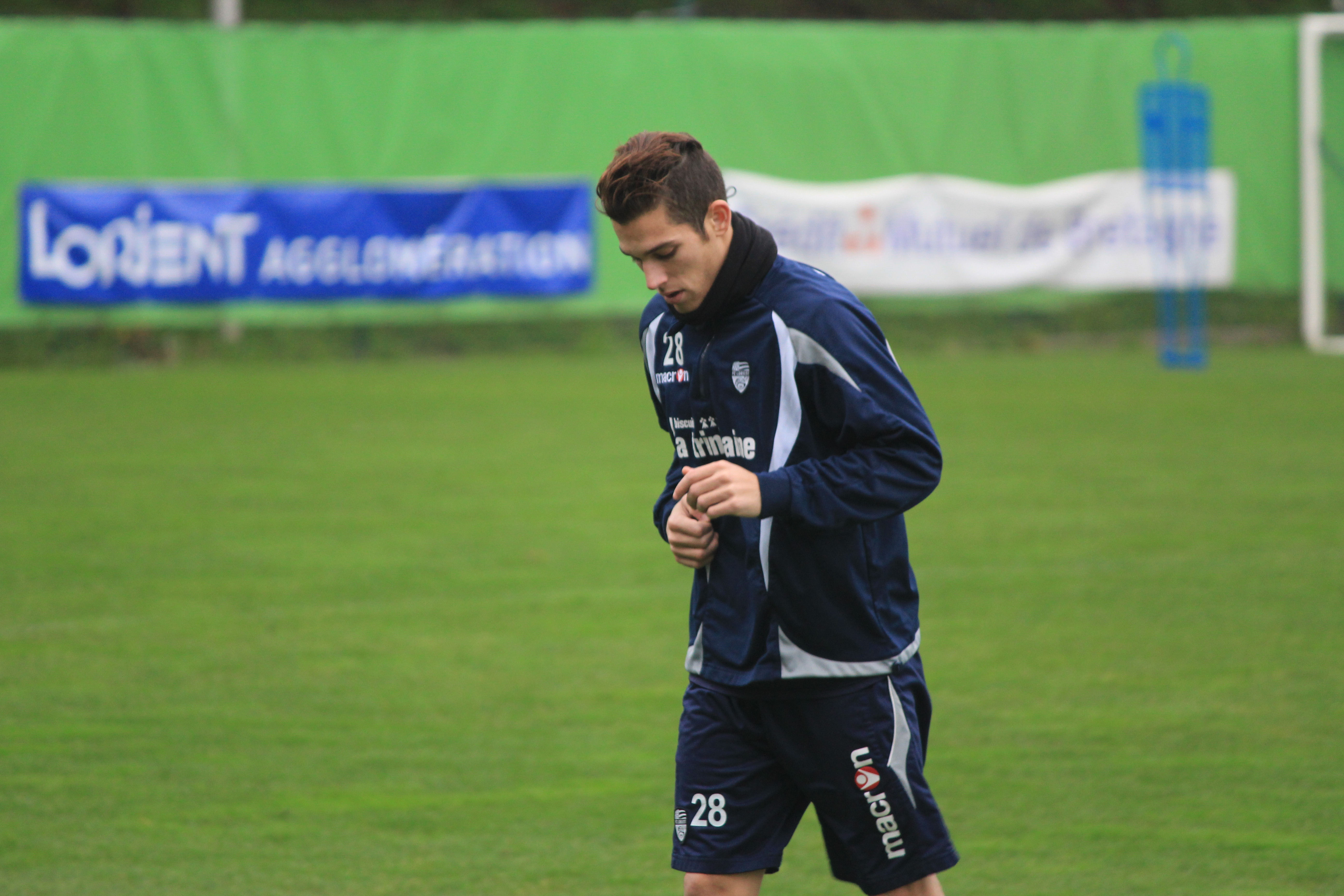 Maxime Barthelmé pendant un entrainement du FC Lorient le 3 janvier 2012